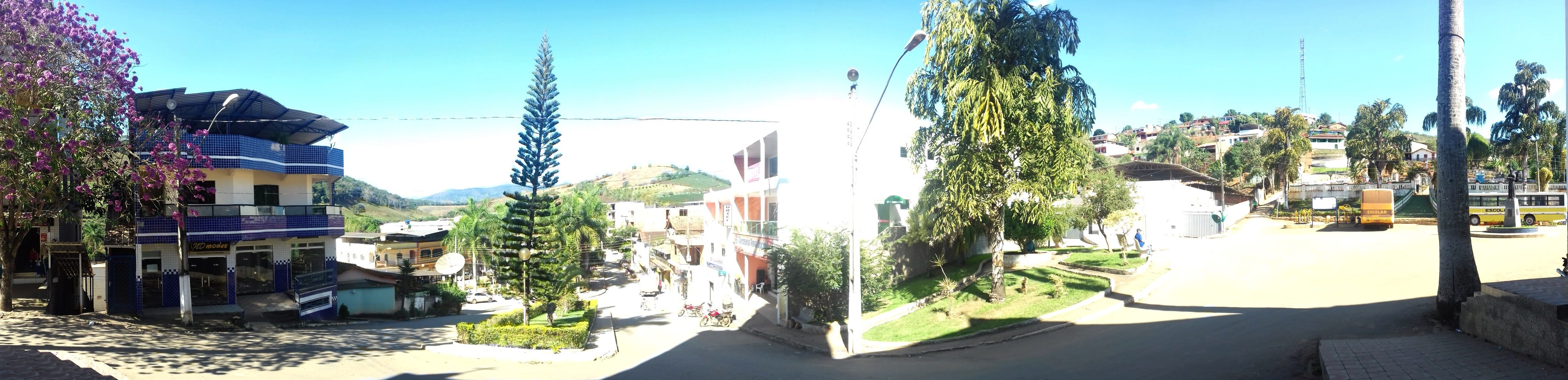 Panorâmico área central de Vermelho novo.